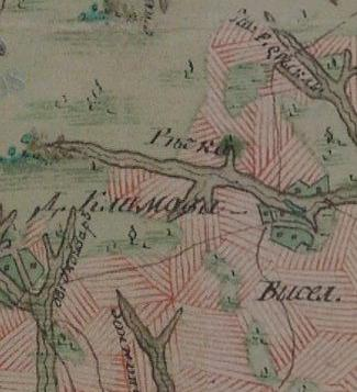 Село Климова и его окрестности. Фрагмент плана Генерального Межевания уездов и губерний Российской Империи. Масштаб: 2 версты в дюйме (1 см-840м, 1:84000).